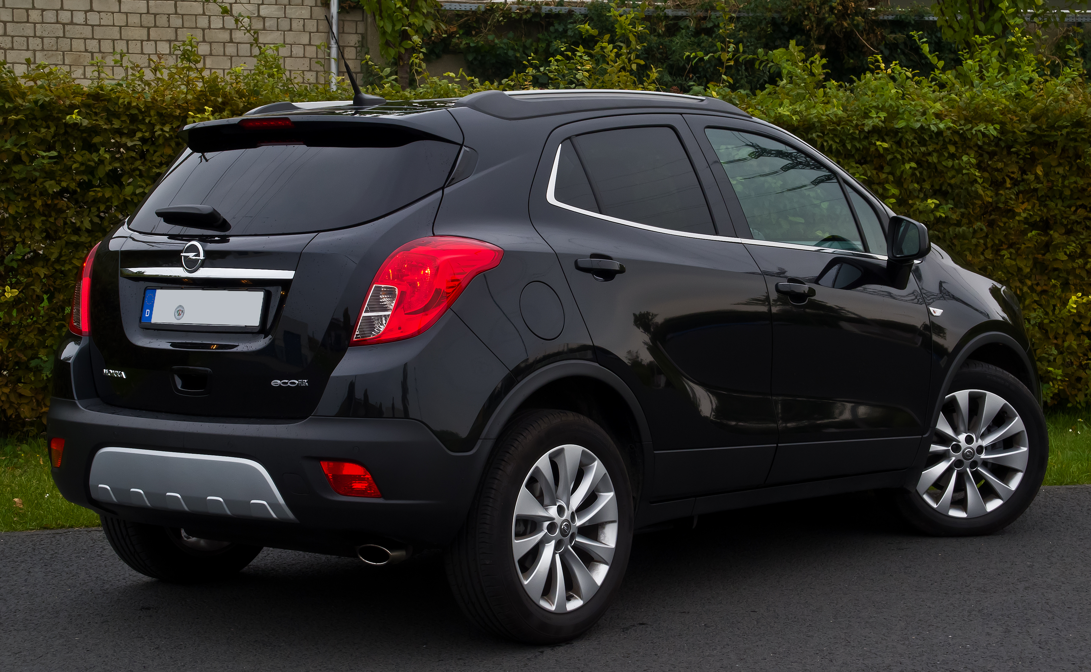 Opel Mokka 1.4 Turbo ecoFLEX Innovation